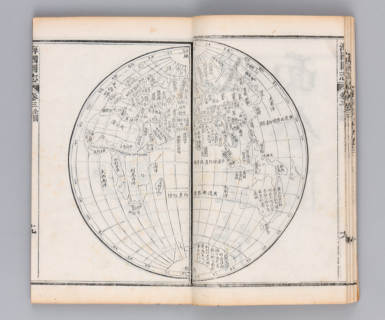 《海國圖志》卷三：東半球全圖